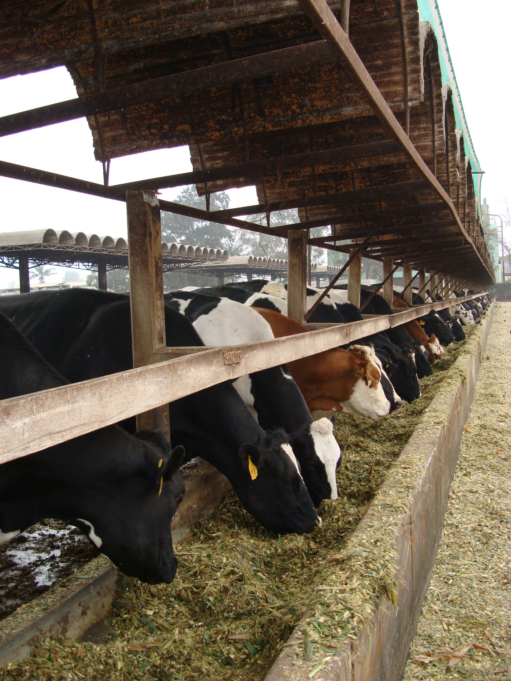 Granja de bovinos de la Universidad Nacional Agraria La Molina (UNALM), Lima, Perú